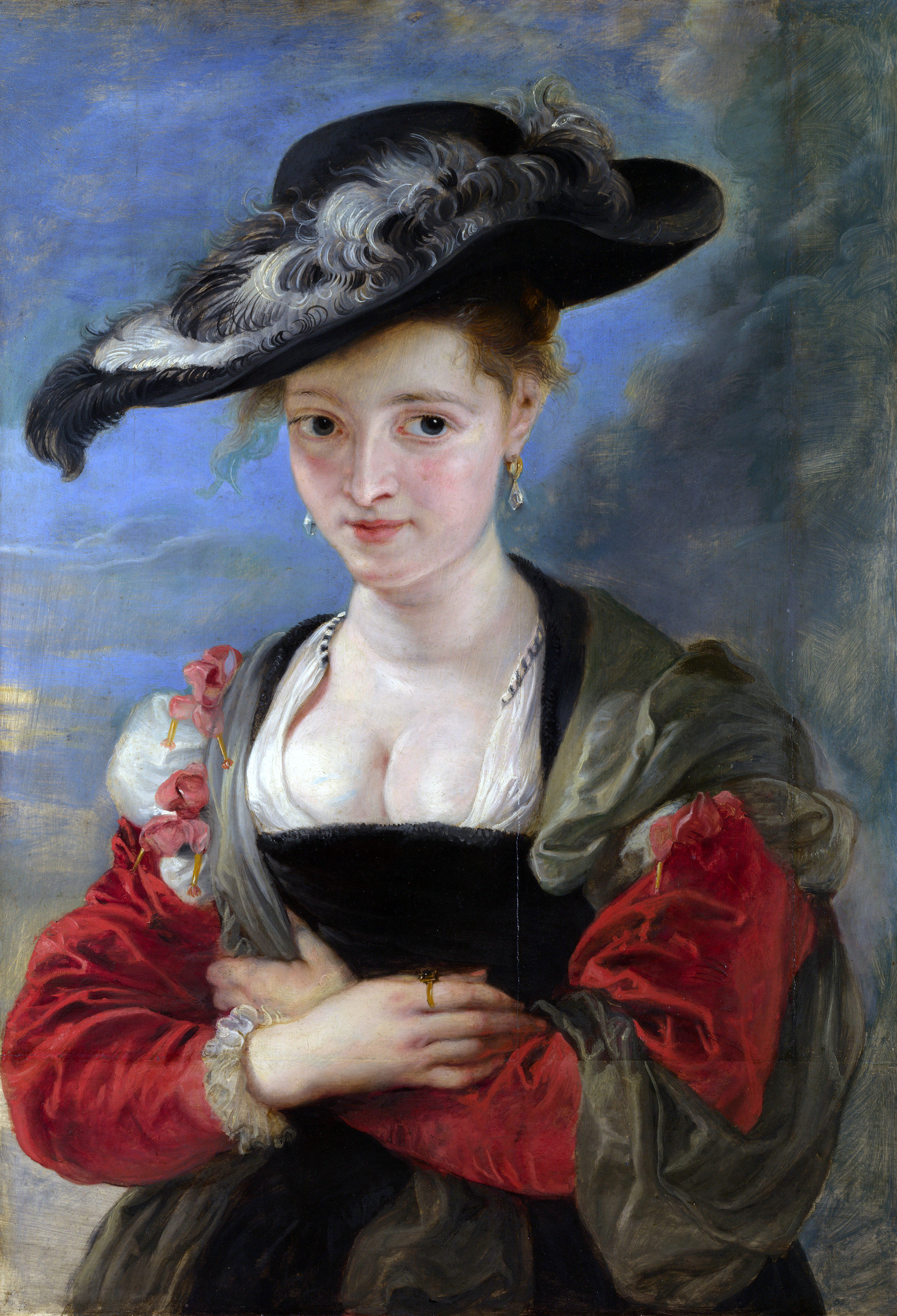 Portrait of Susanna Lunden(?)